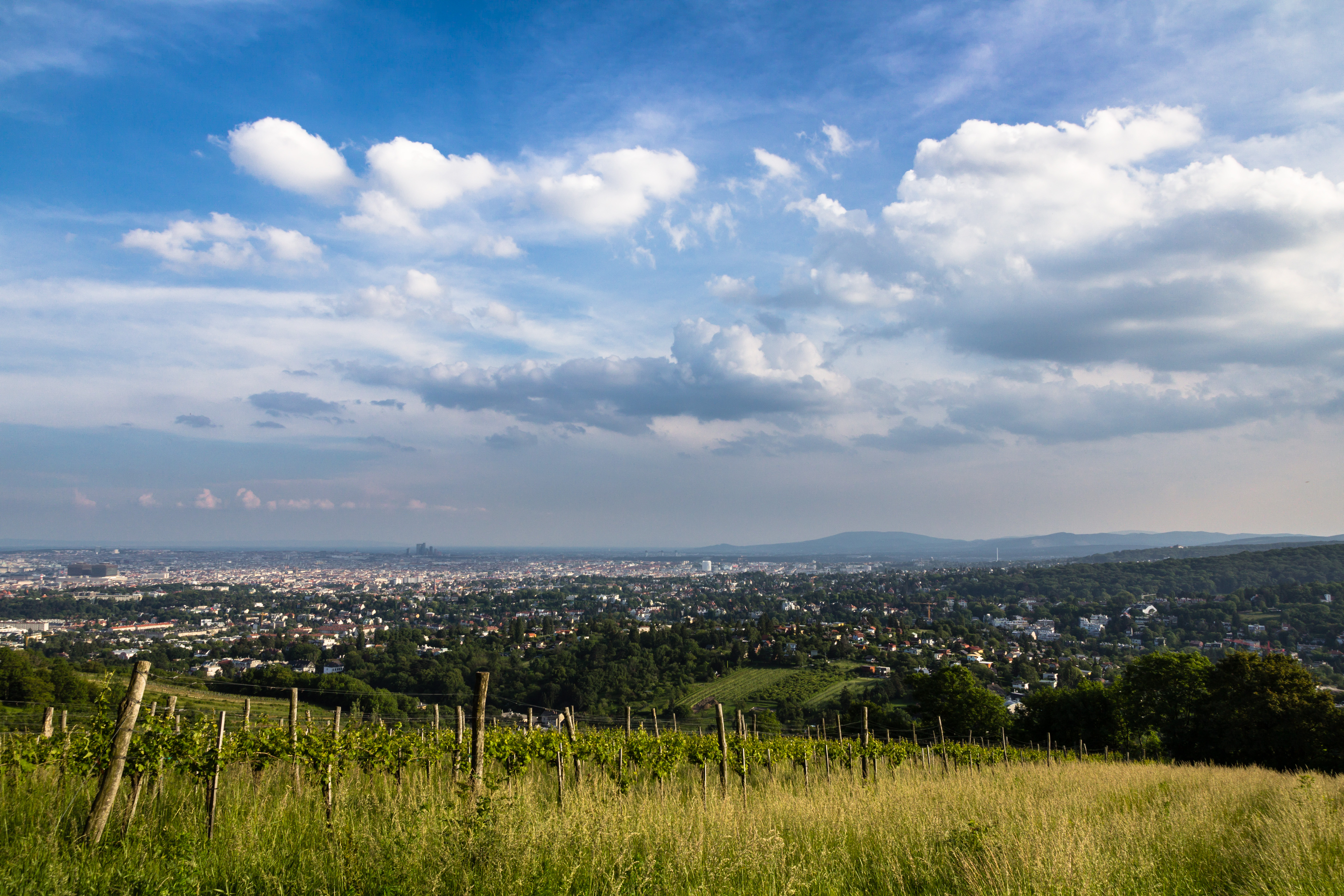 View of Vienna from Kahlenberg.